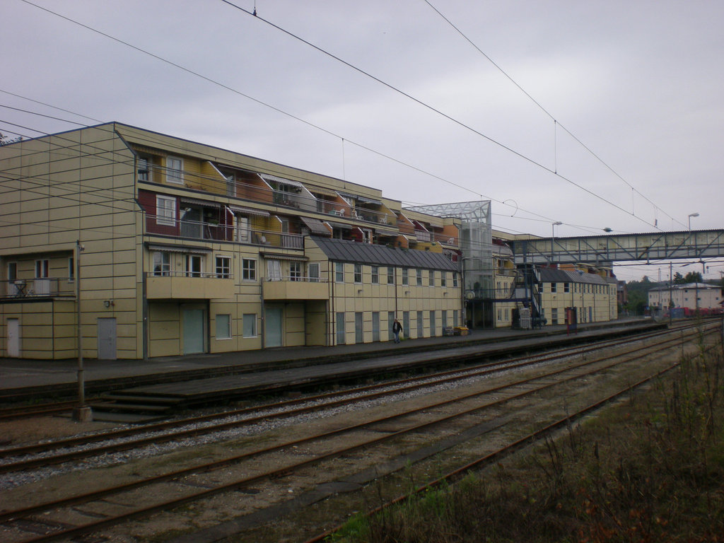 Mysen stasjon.